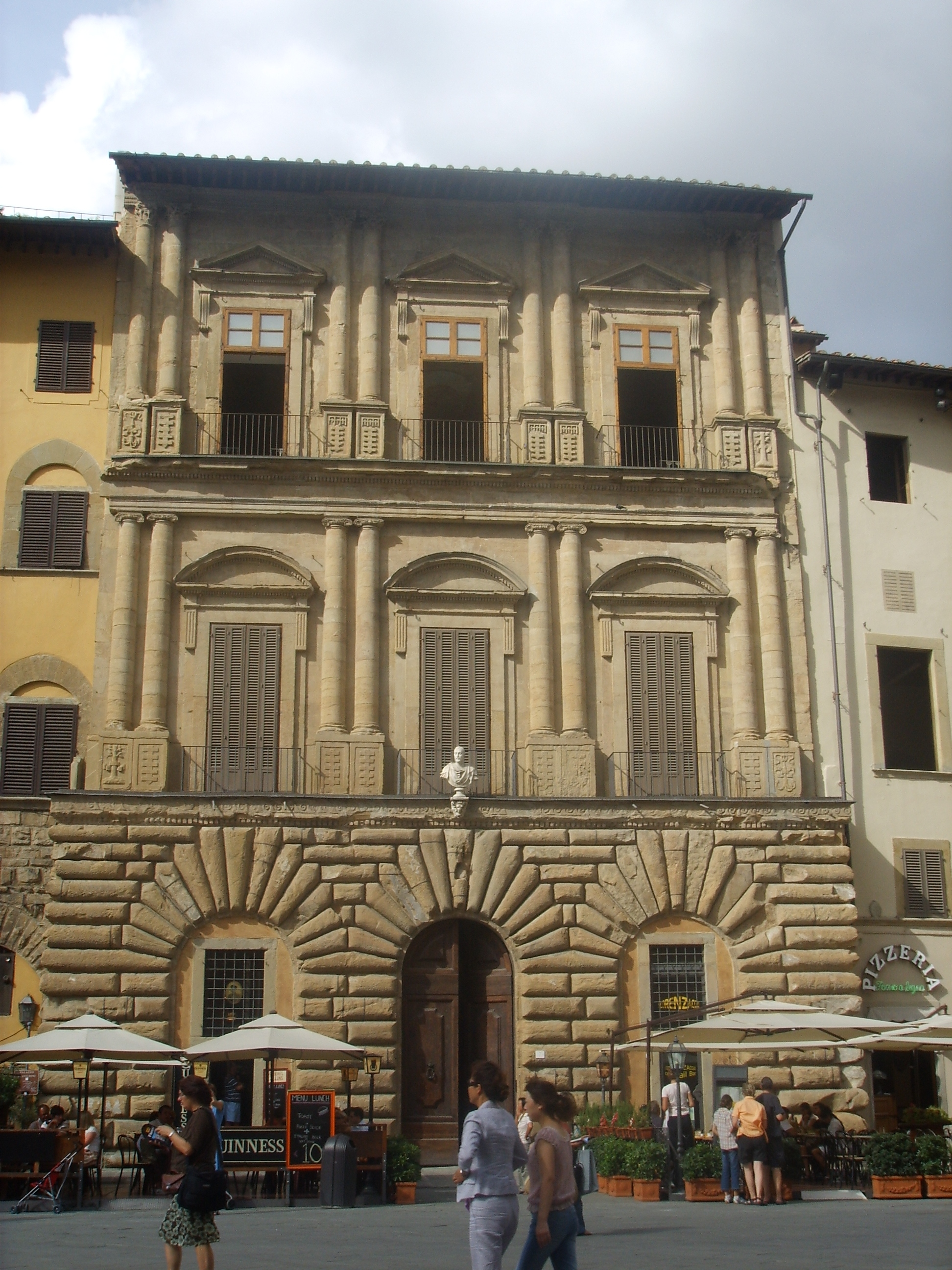 Palazzo Uguccioni in Florence, italy